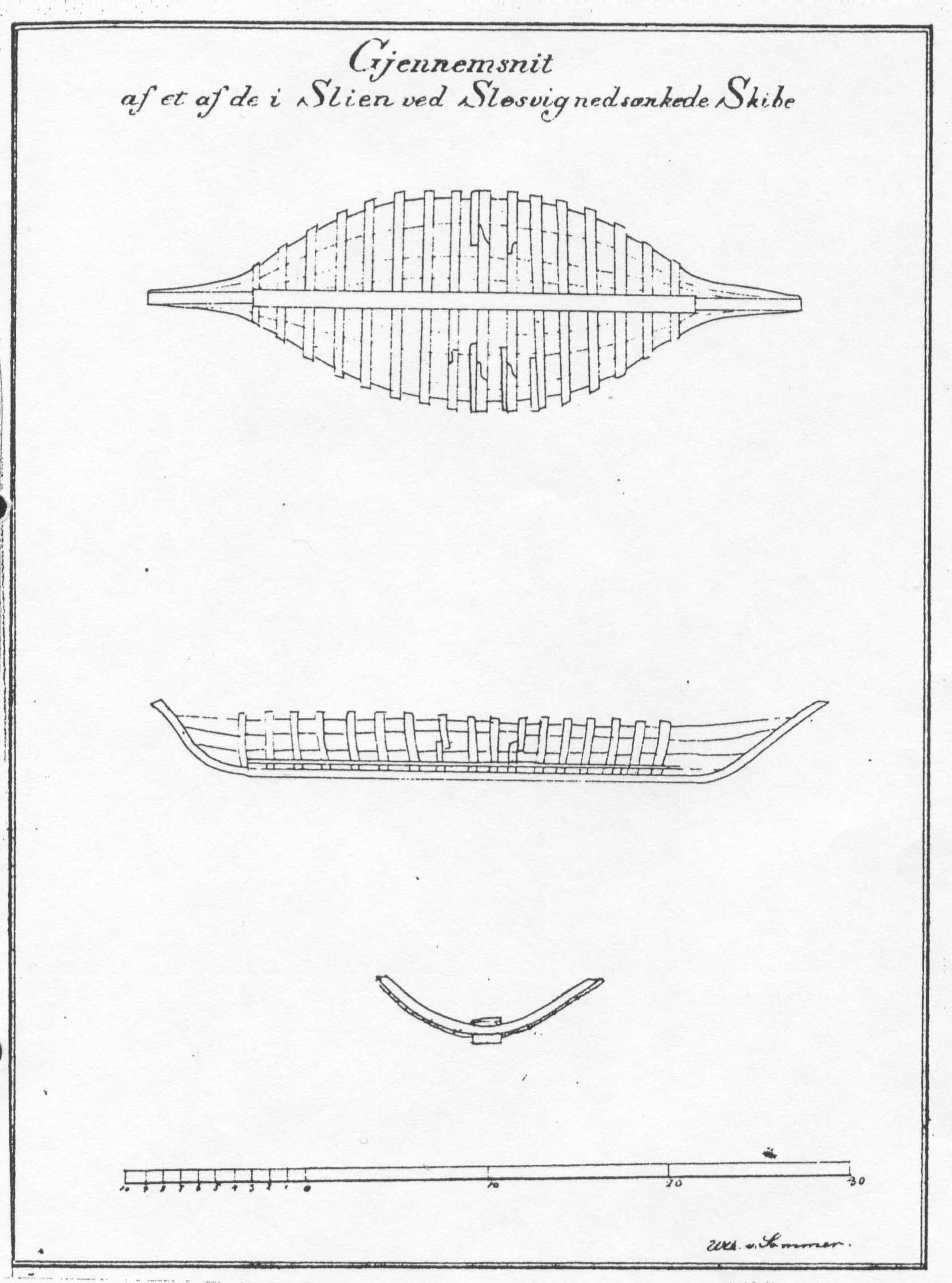 Dokumentation 1859 eines Schiffswracks im Schleswiger Tegelnoor